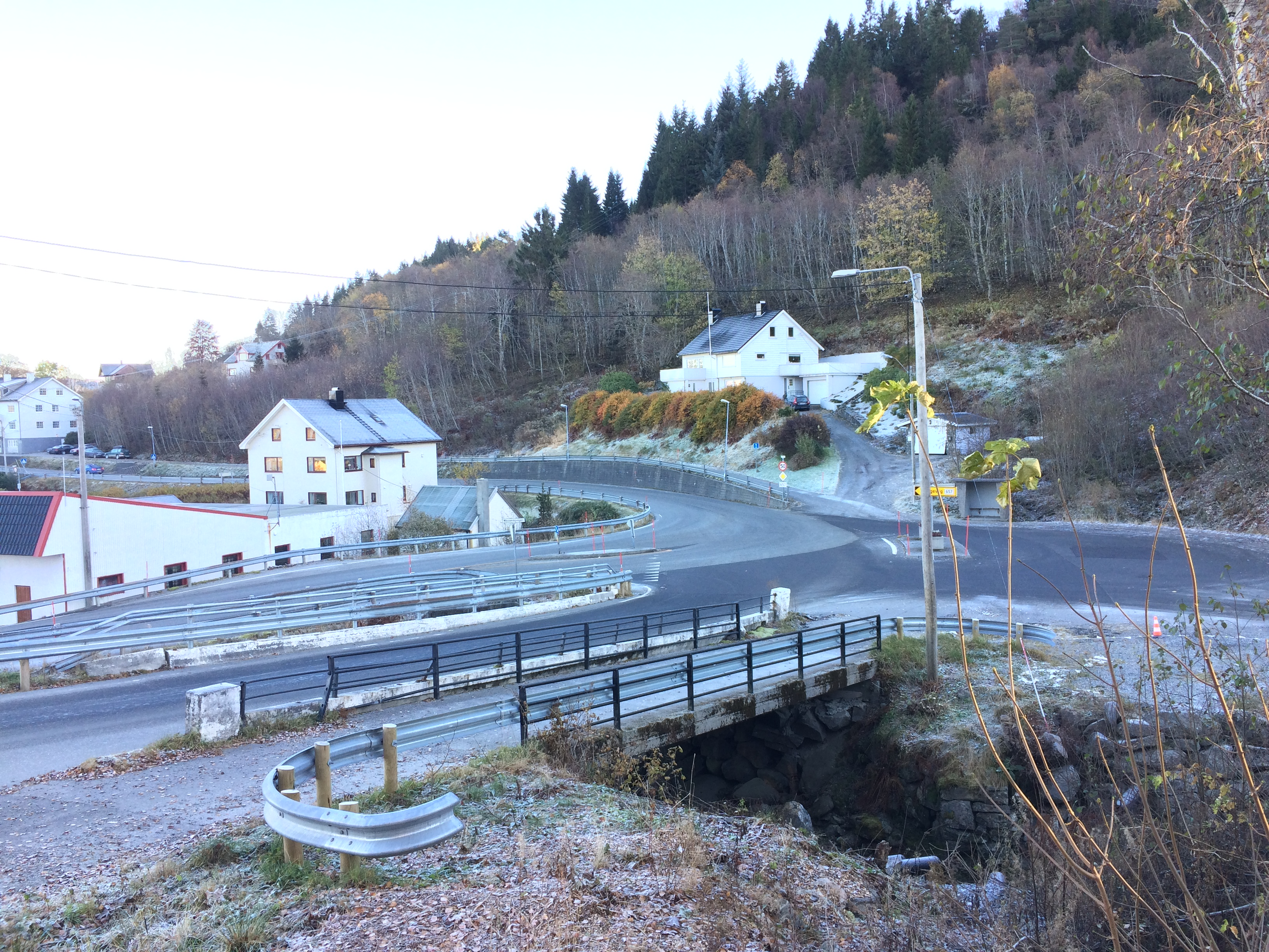 Krysset i mauseidvågen.